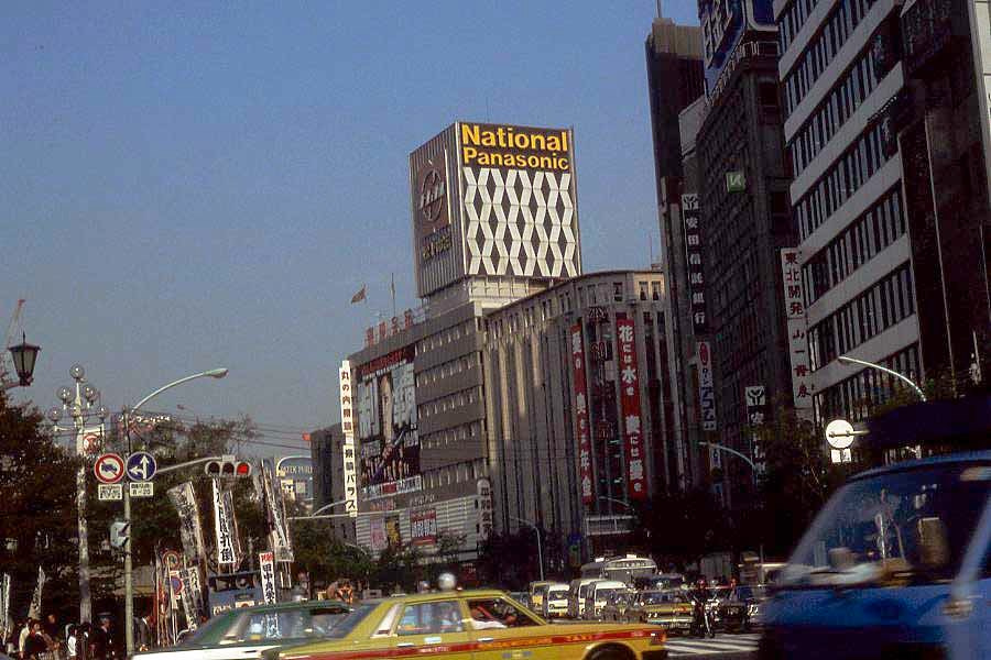 丸の内TOEI (丸の内東映、丸の内東映パラス) 制覇 誘拐報道